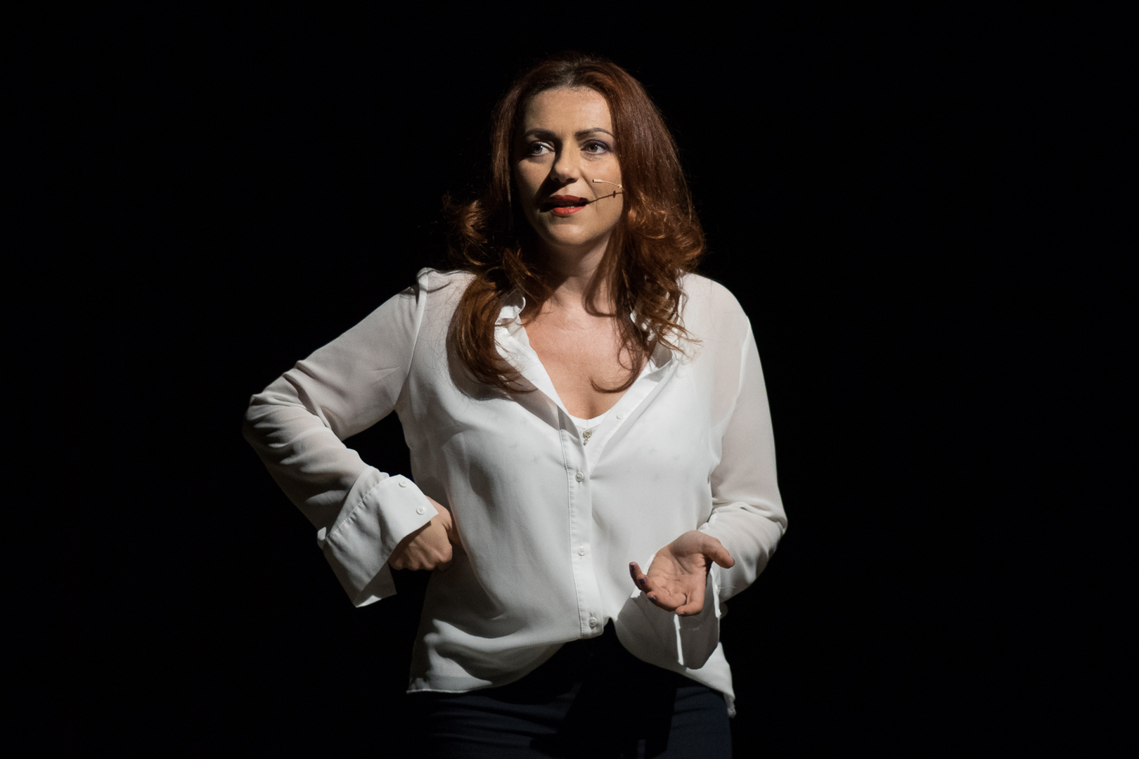 Due donne ai raggi X (7)